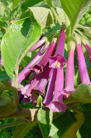 Iochroma grandiflora